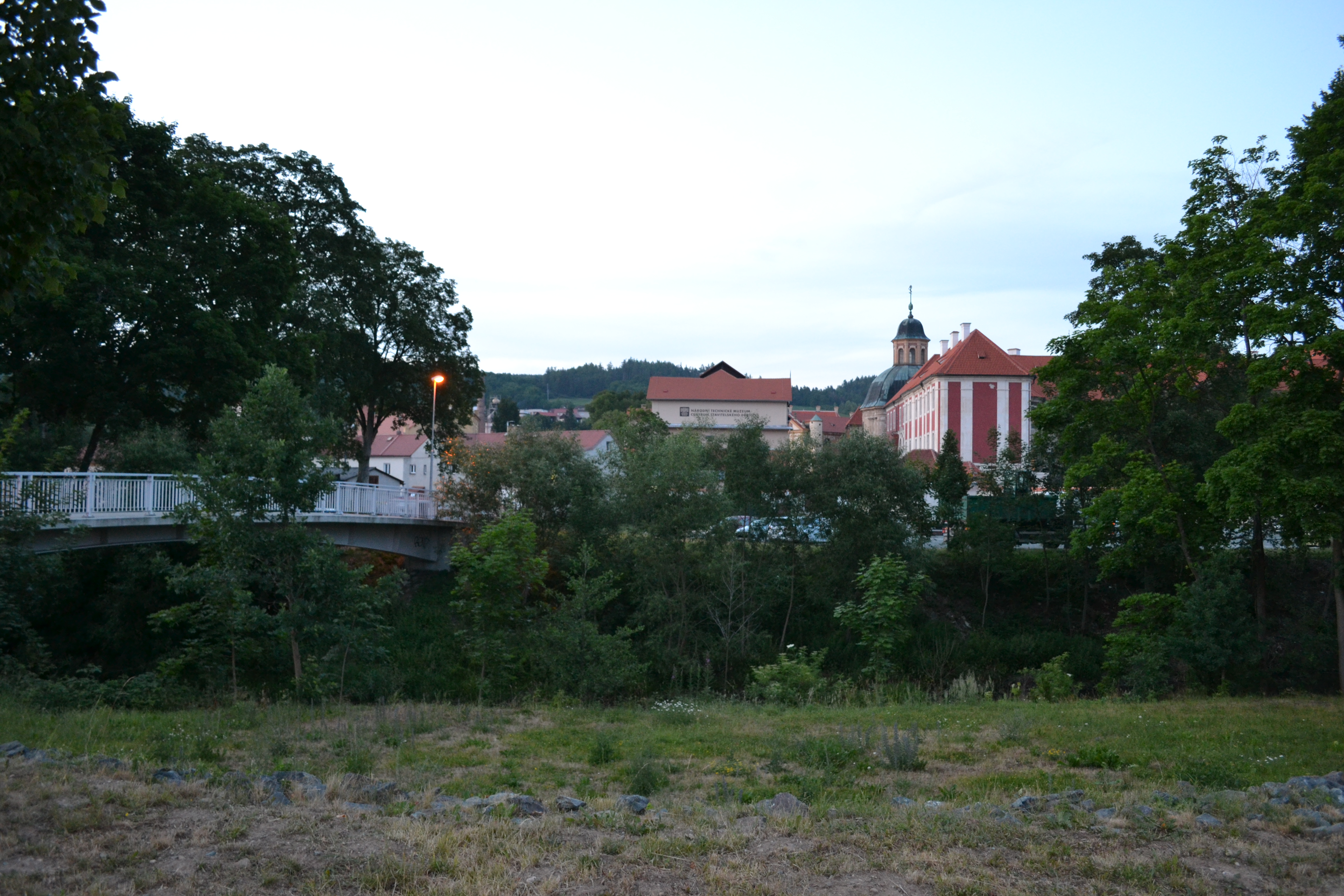 Pohled na plaský klášter od kruhového objezdu